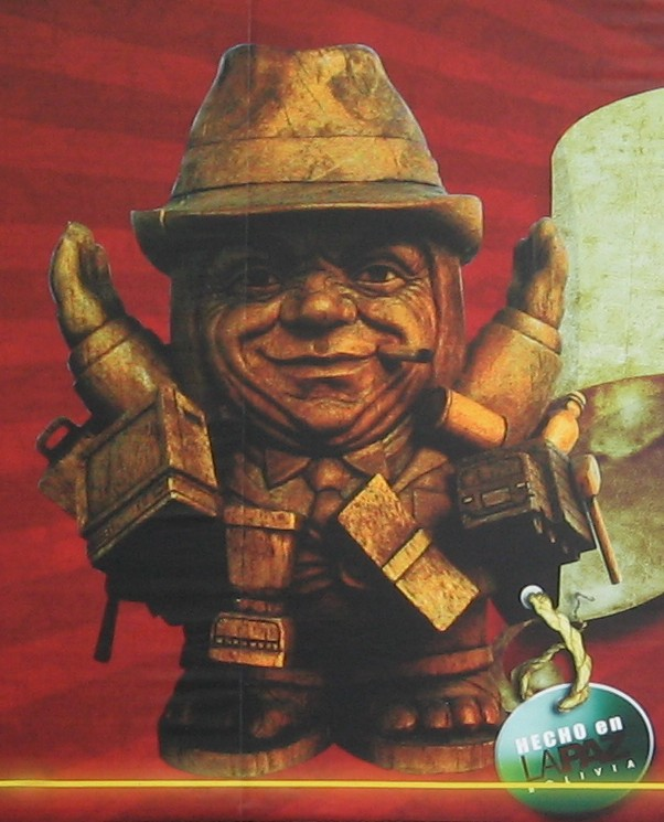 El Ekeko. Cartel público en Alasita 2008 en La Paz